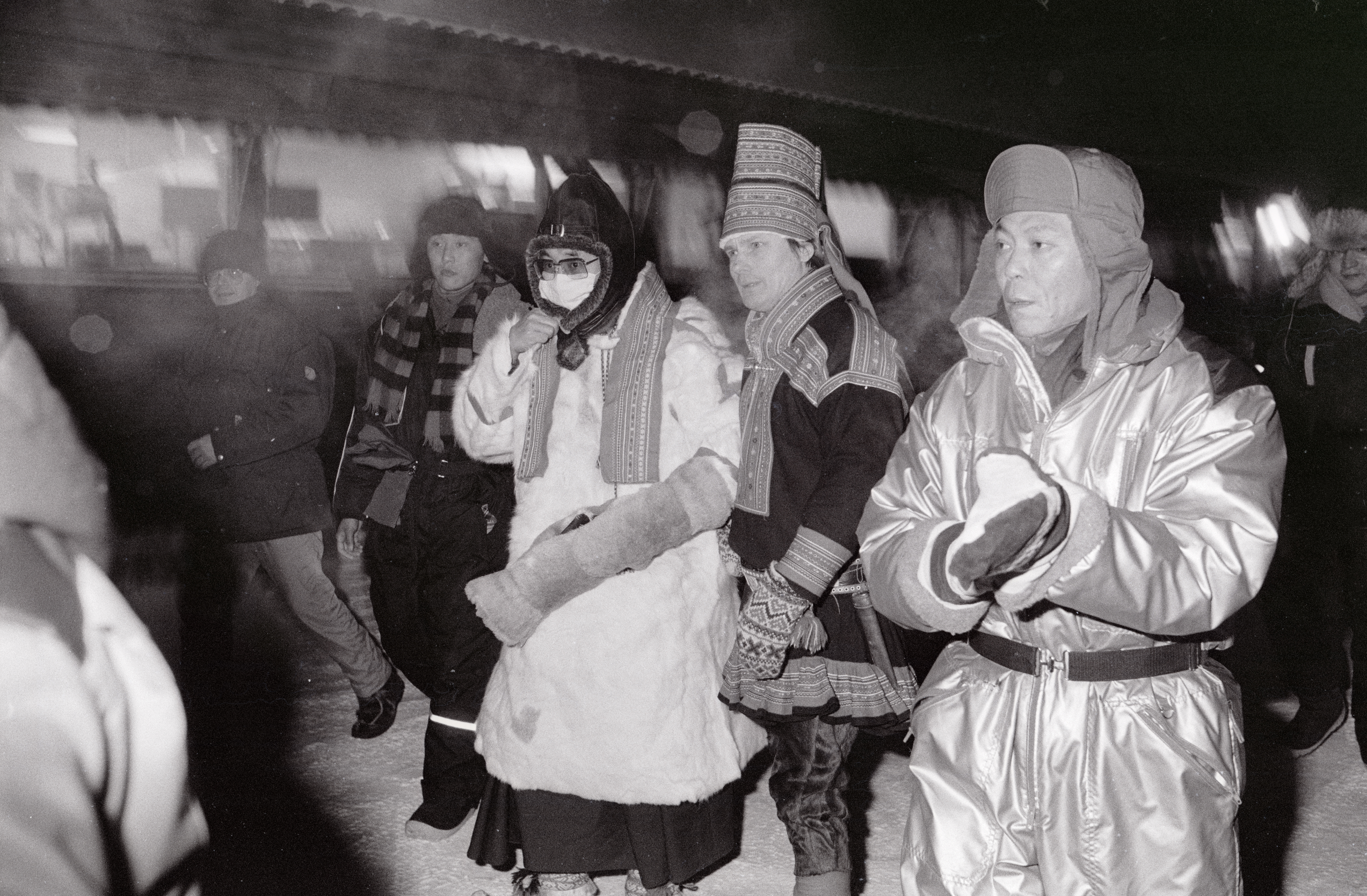 Den 14. Dalai Lama besøkte Sametinget og Karasjok i 1989 i forbindelse med sitt besøk i Norge i forbindelse med at han vant Nobels fredspris. Foto: Harry johansen.